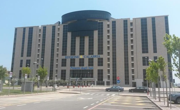 Catanzaro - Palazzo degli Itali, sede della presidenza della giunta regionale calabrese e degli uffici regionali.